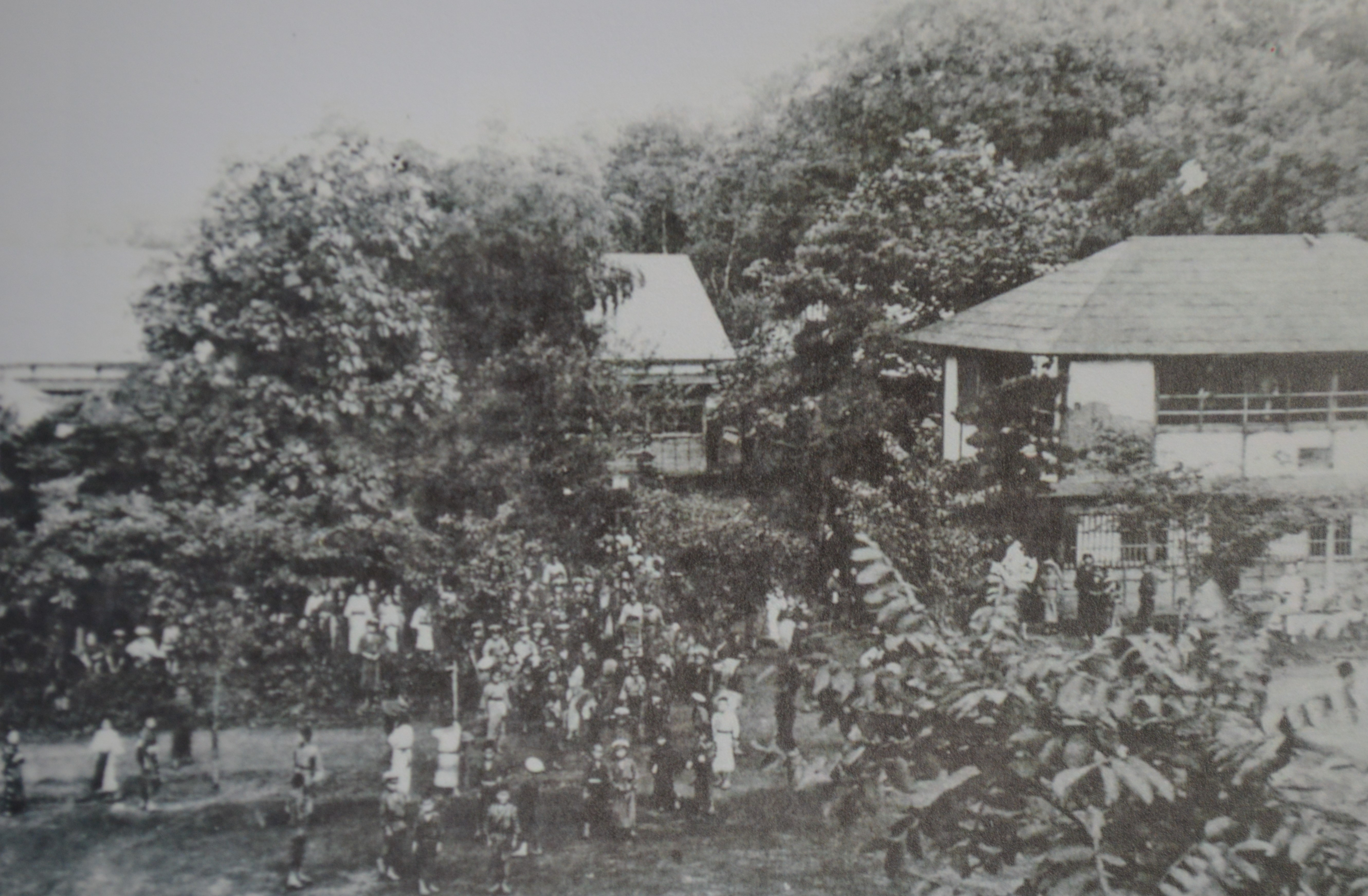 東京都北多摩郡久留米村の久留米尋常高等小学校。現在の東久留米市立第一小学校。